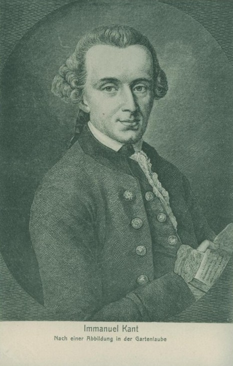 Kantabbildung